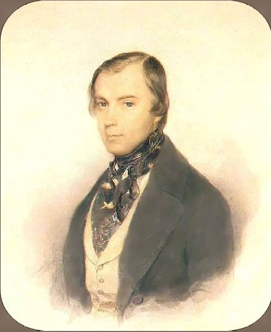 Соколов Петр Федорович. Портрет О.И. Сенковского. 1830-e гг